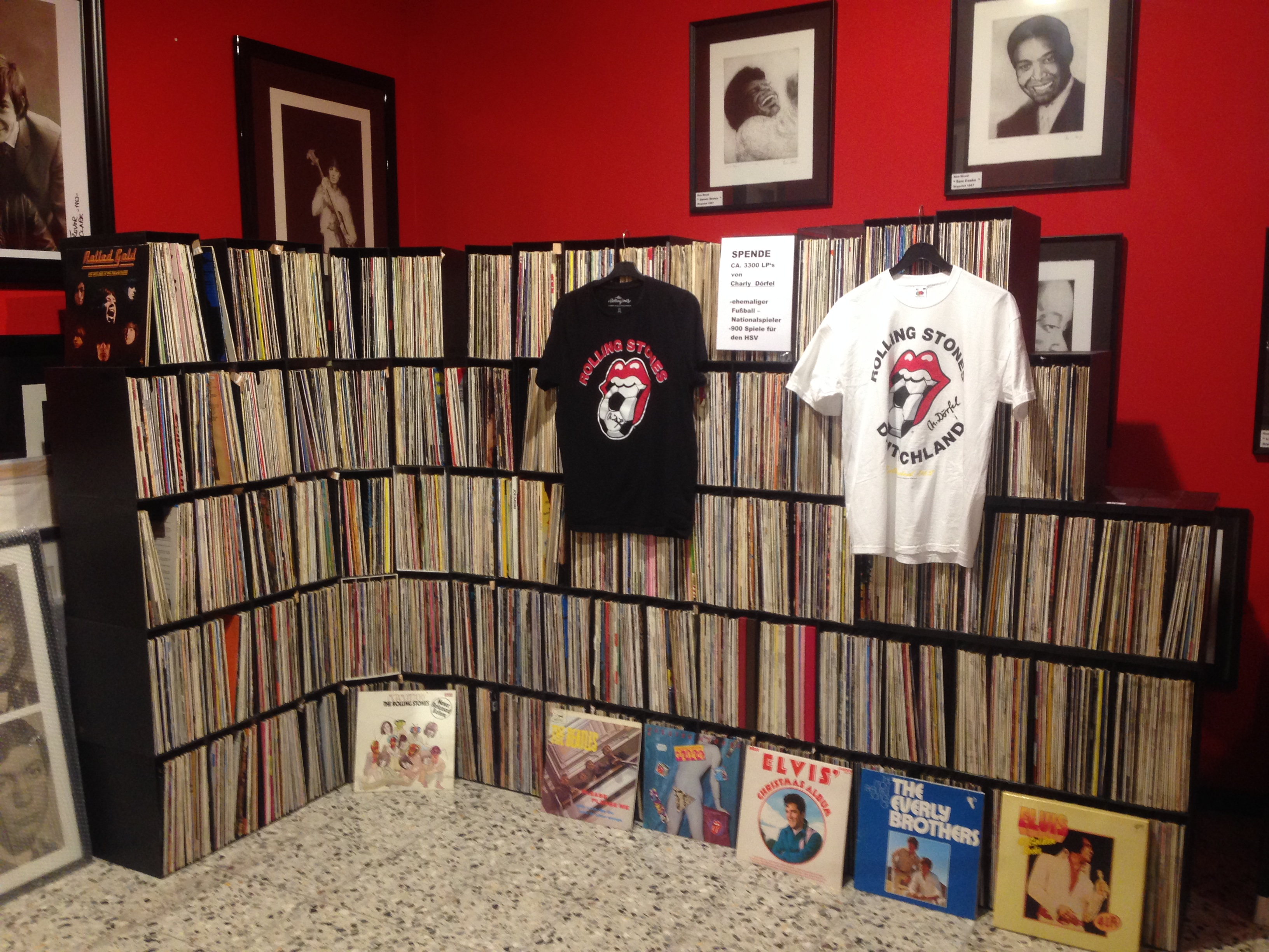 Stones Fan Museum, Lüchow, Germany